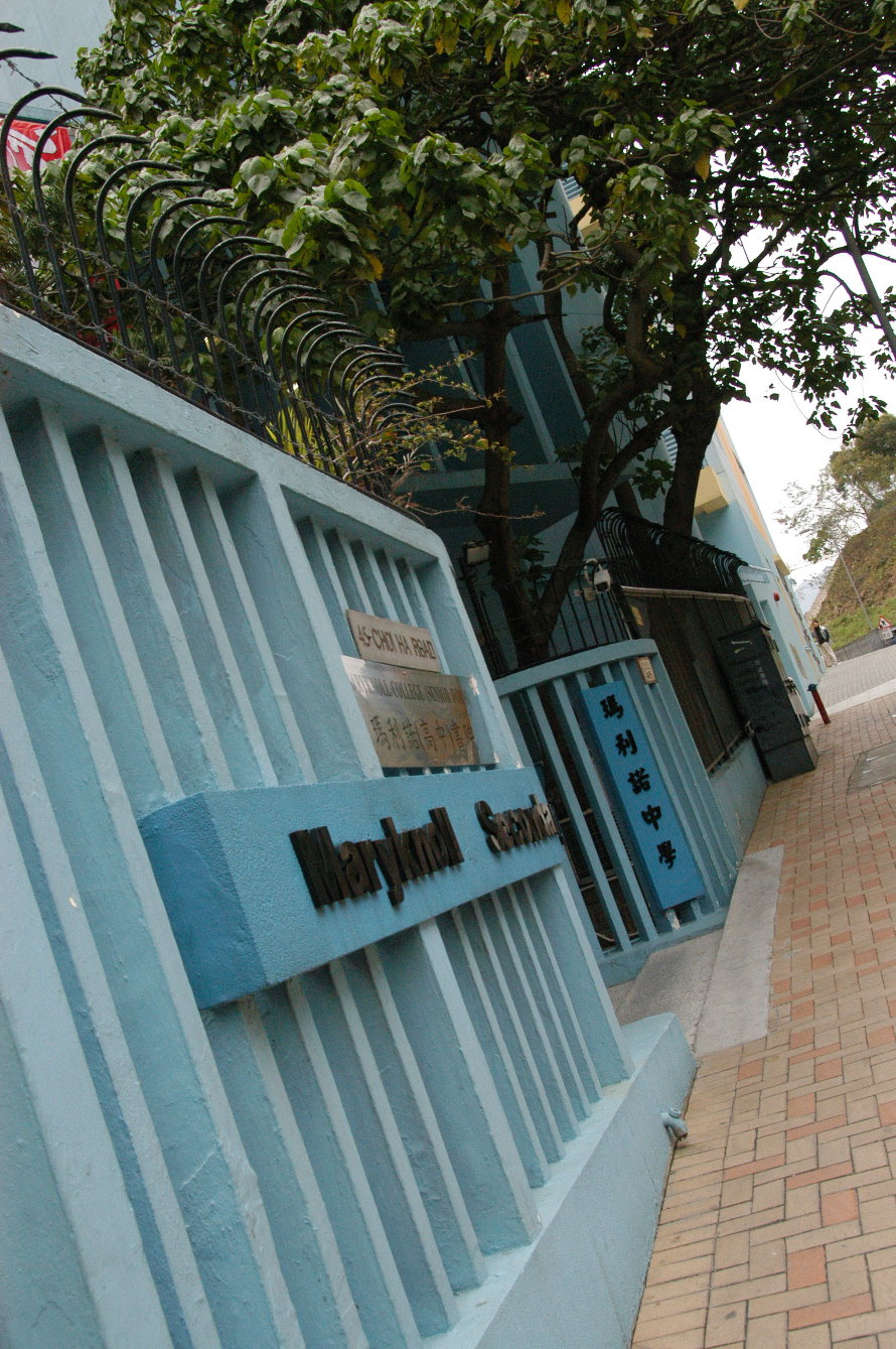 瑪利諾中學大門